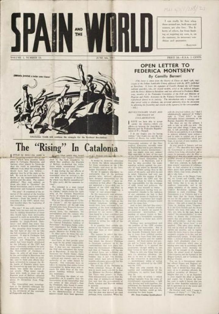 Spain and the World (1936-1938) est le nom d'un journal anarchiste publié par Freedom Press, initié en soutien à la révolution sociale espagnole de 1936 et aux anarcho-syndicalistes de la Confédération nationale du travail.